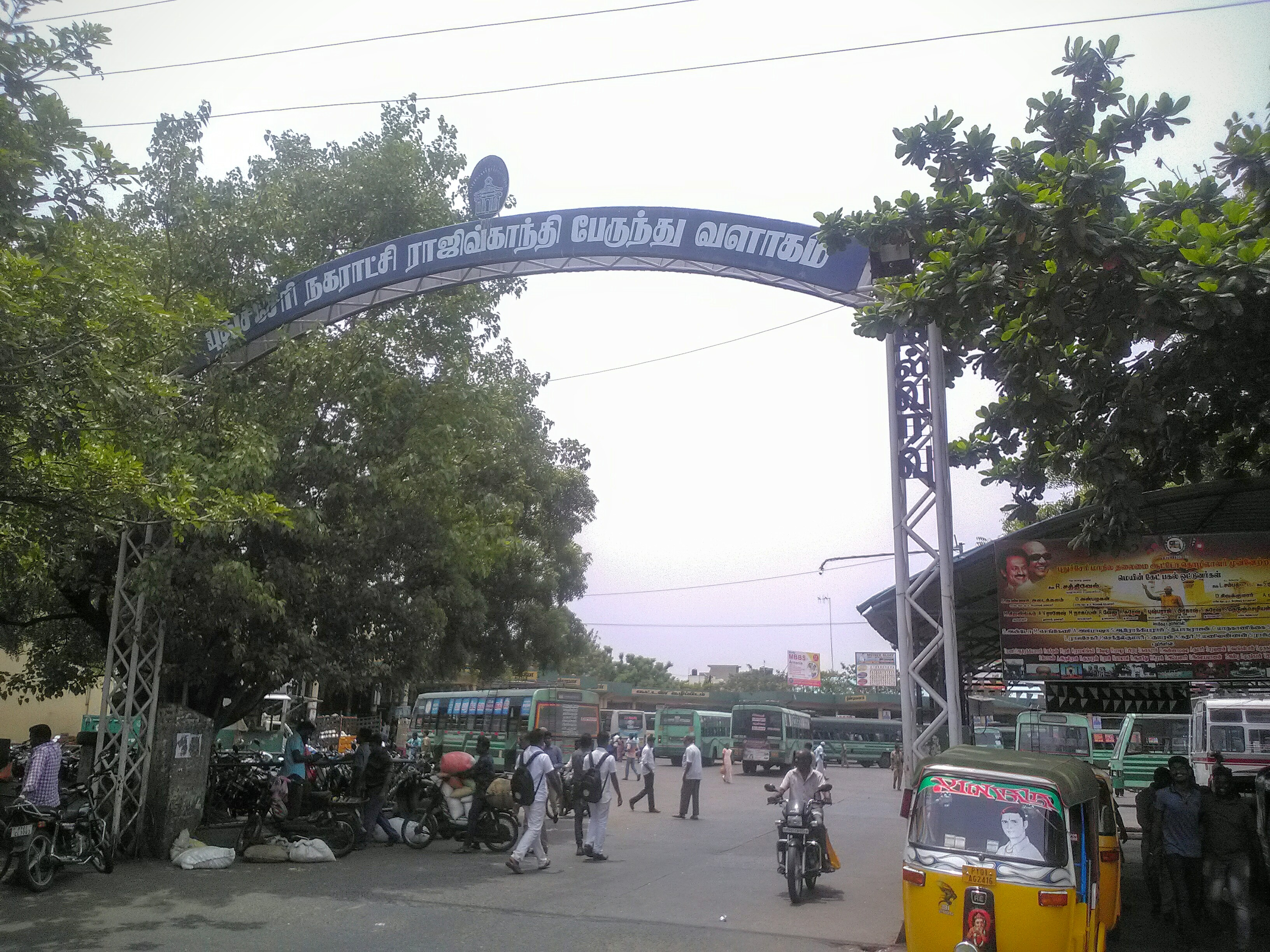 புதுச்சேரி பேருந்து நிலையத்தின் நுழைவாயில்.